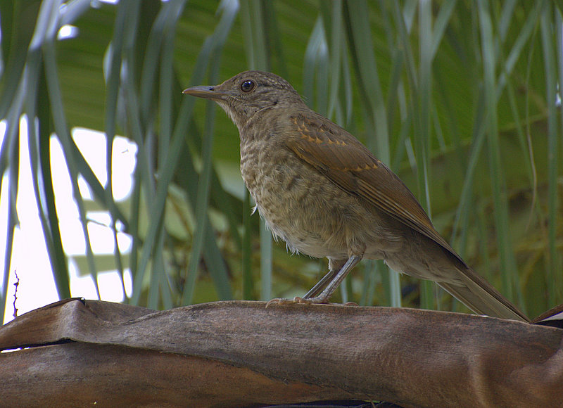 Turdus leucomelas Parque da Independência, Museu do Ipiranga, São Paulo